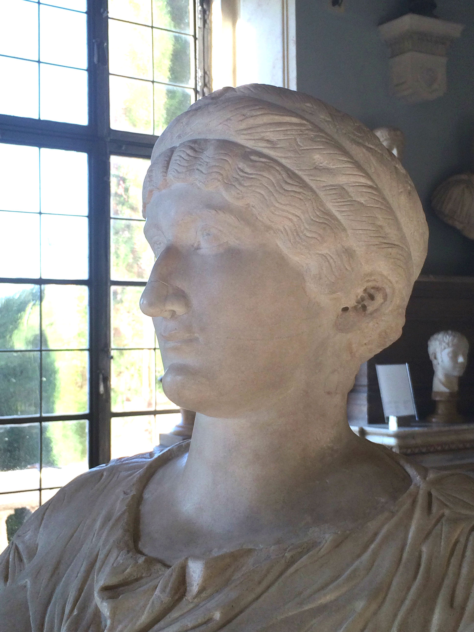 Статуя святой Елены в Капитолийских музеях